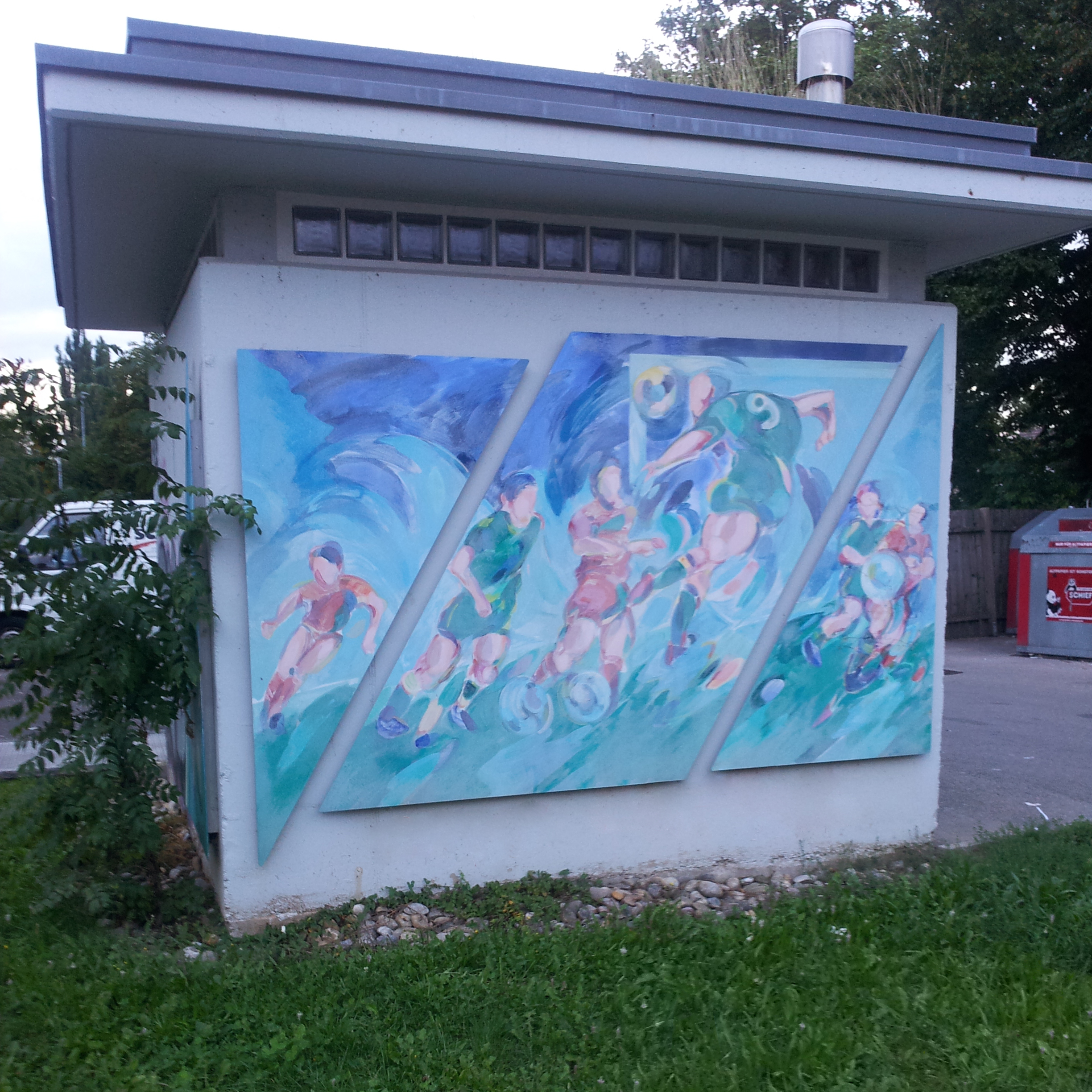 Pumpenhäusschen in Kernen-Stetten mit Kunst von Ulrich Zeh.